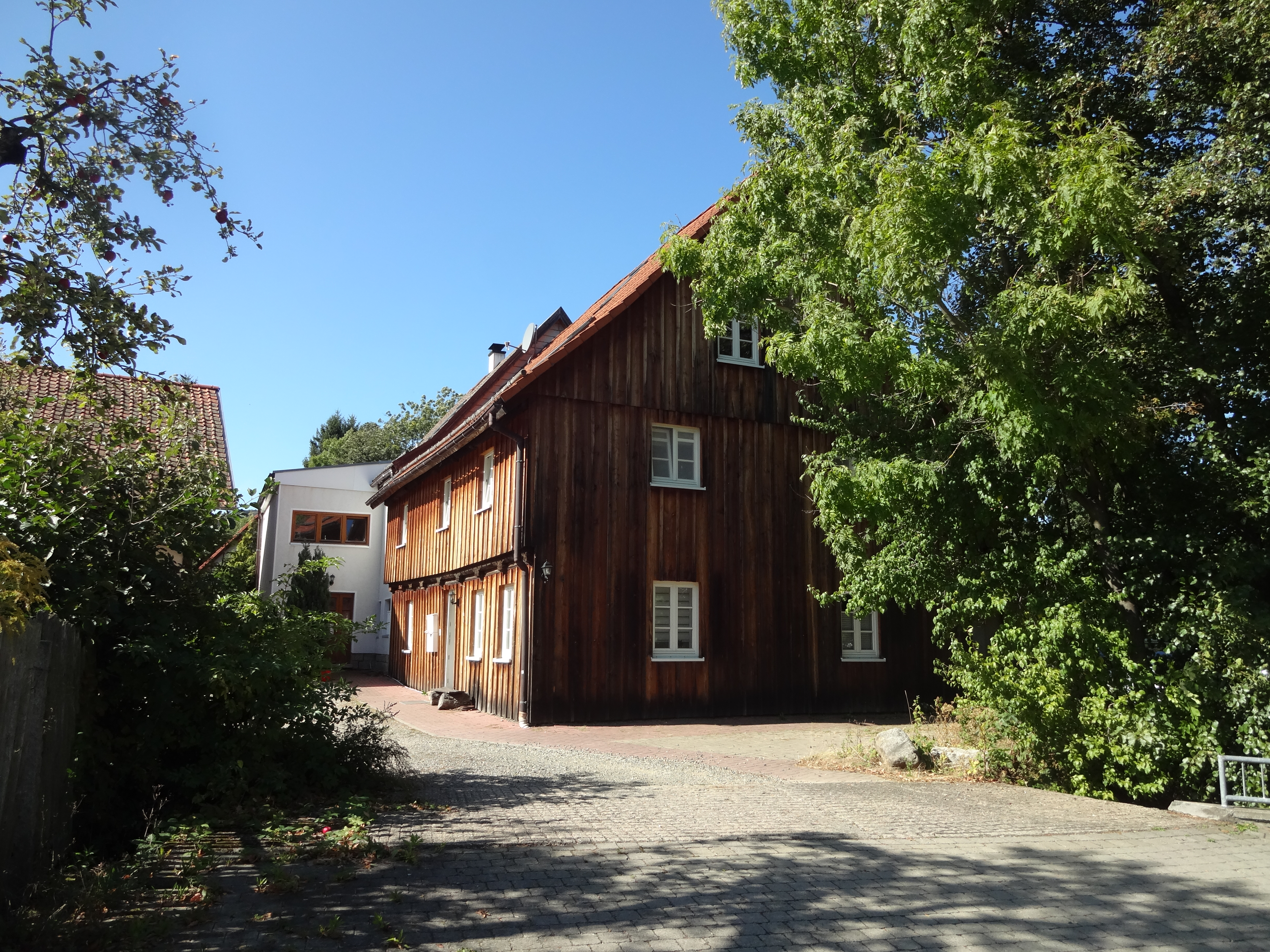 denkmalgeschütztes Gehöft in der Dorfstraße 6 in Darlingerode